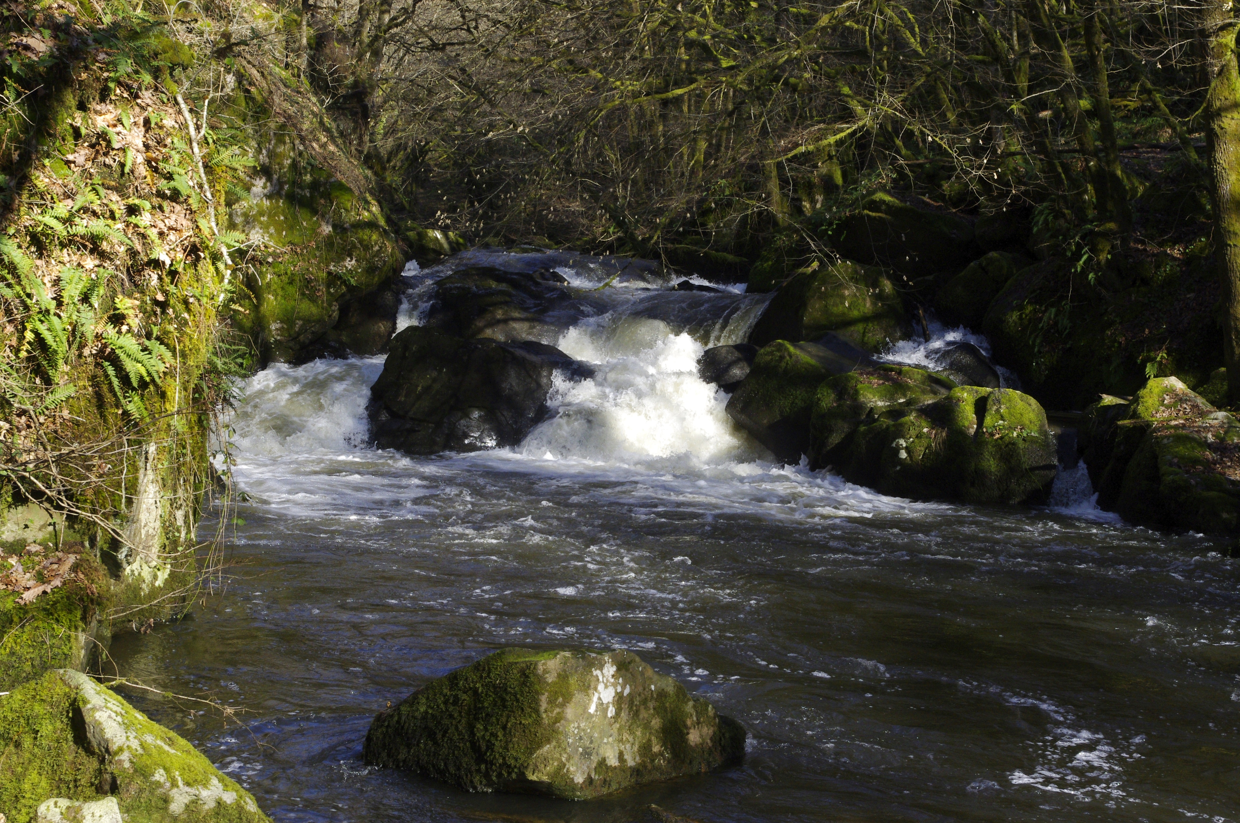 La Dronne en limite des communes de Champs-Romain et Saint-Saud-Lacoussière dans le Nord du département de la Dordogne. La cascade "Saut du Chalard".